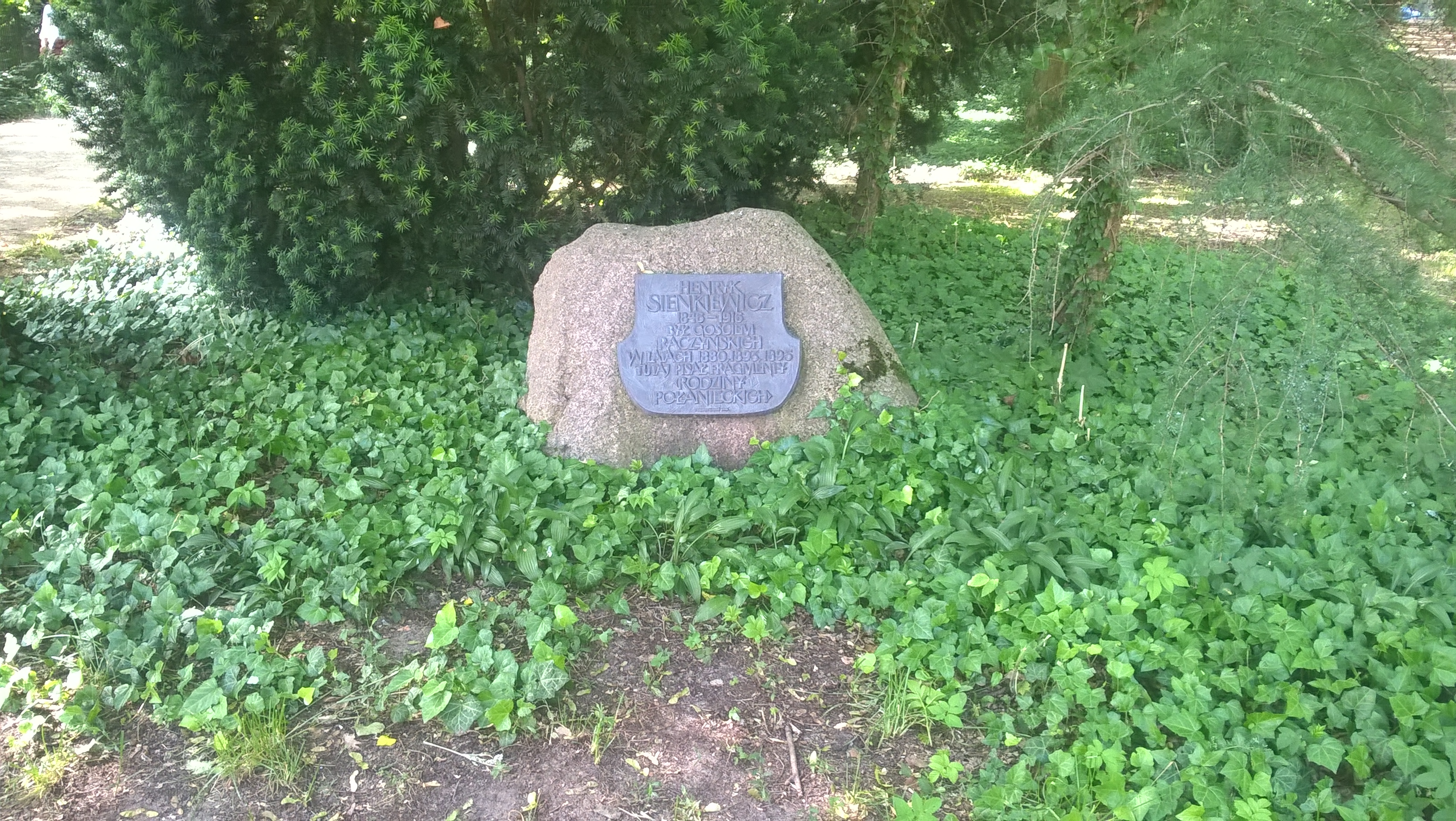 Ogród pałacowy w Rogalinie